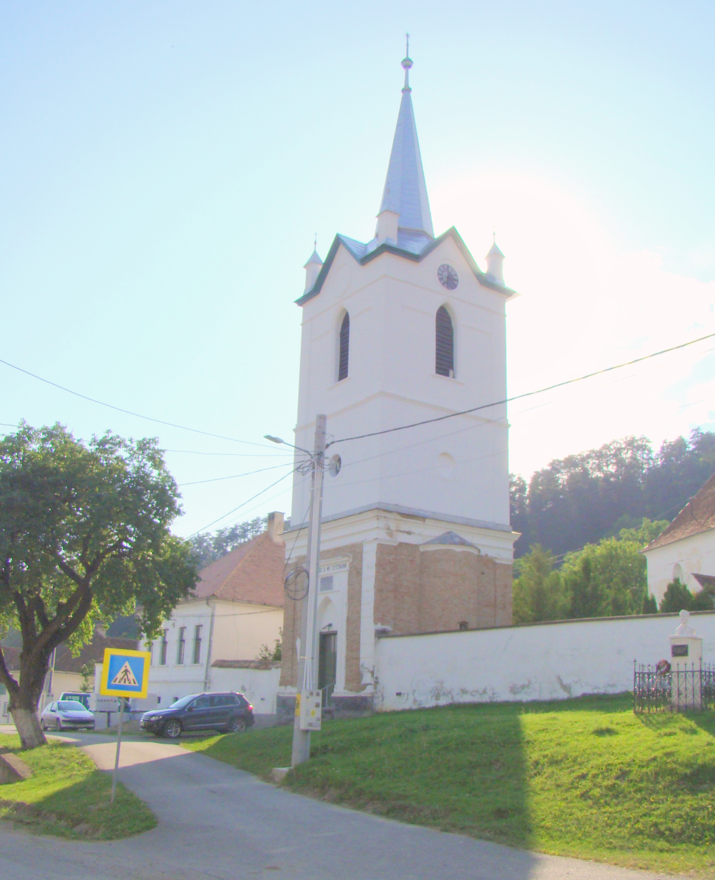 Biserica evanghelică, sat Jimbor; comuna Homorod